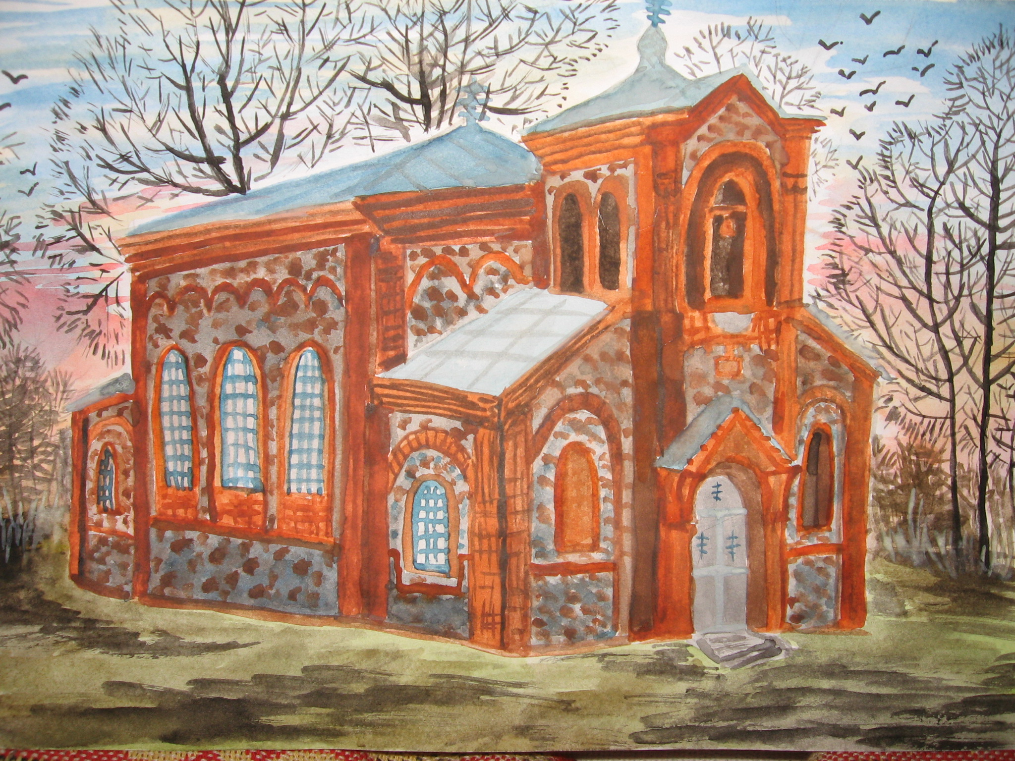 Беларуская (тарашкевіца): Малюнак царквы, в. Лескавічы